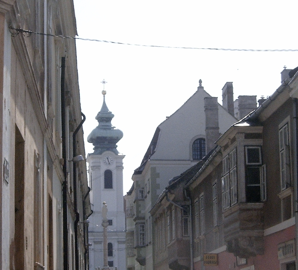 A győri Stelczer Lajos utca